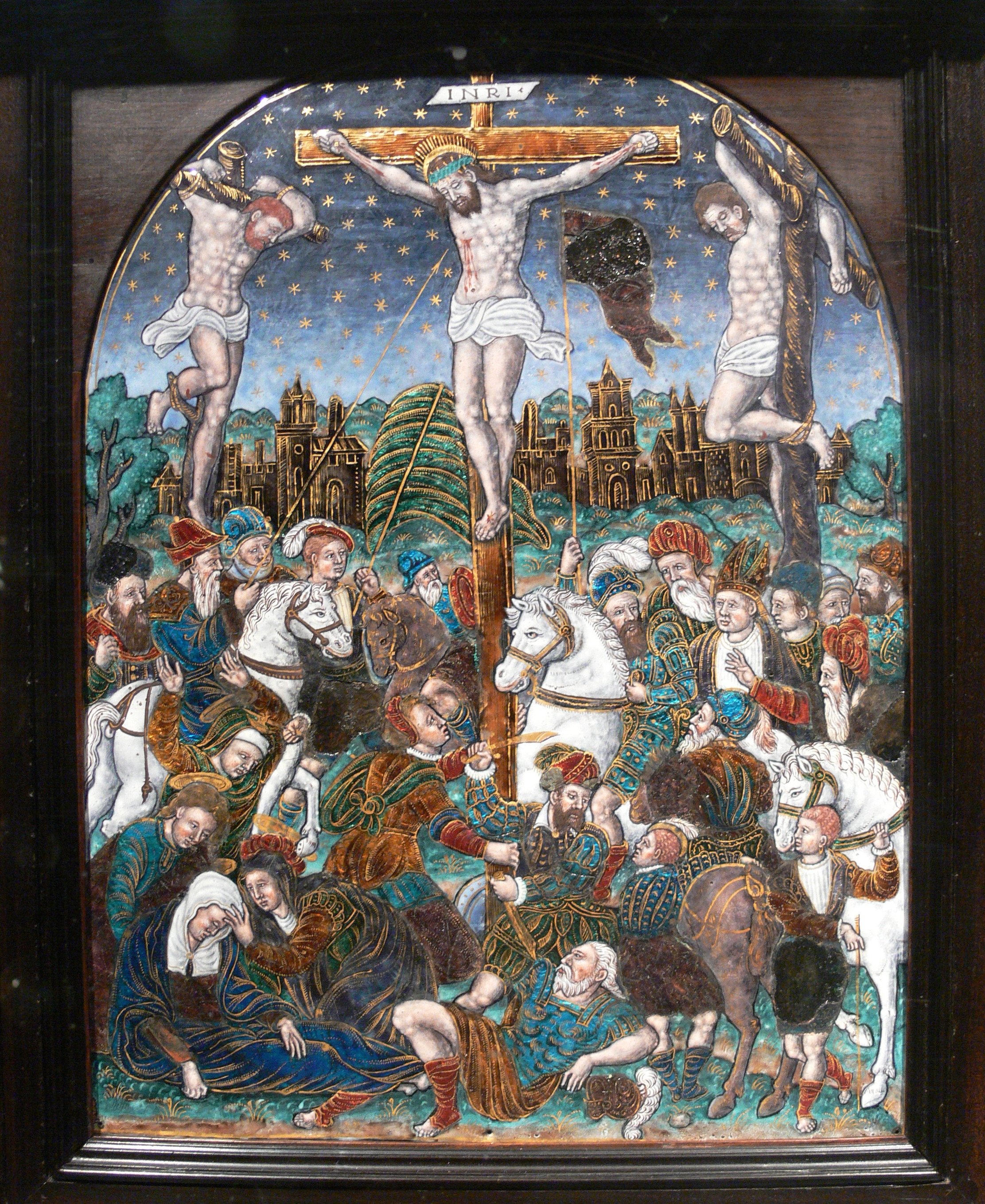 Flügelaltar von Martial Raymond, Limoges, 2. Hälfte 16. Jh.; Detail: Kalvarienberg; Maler-Email in Ebenholzrahmen. Kunstgewebermuseum Berlin, Inv. Nr. K 5044